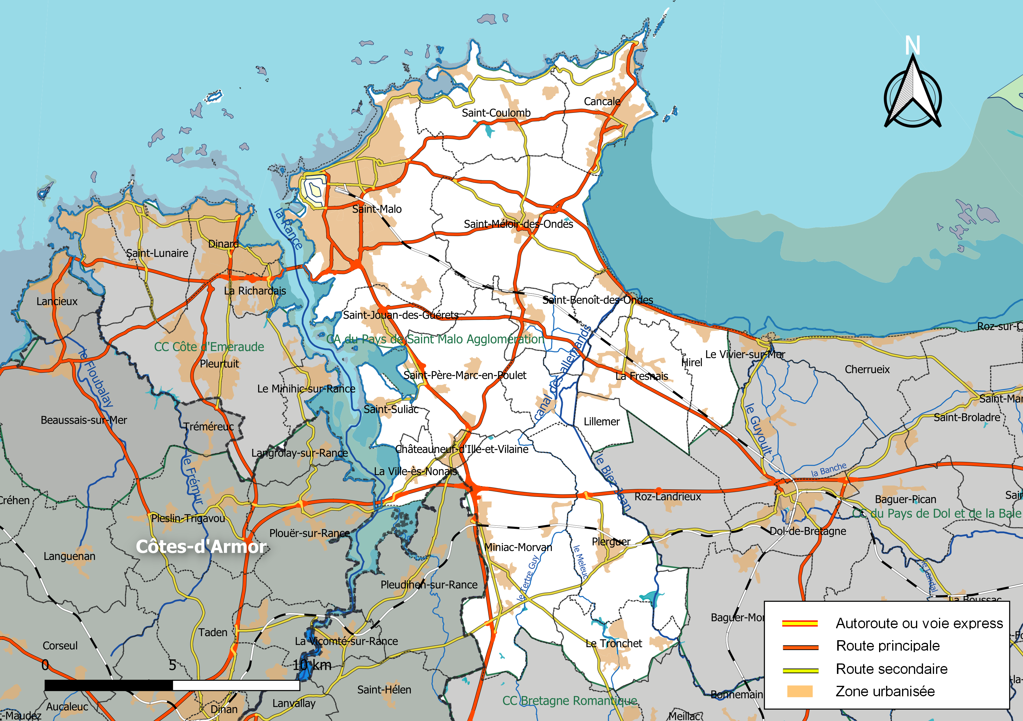 Carte géographique de l'intercommunalité Saint-Malo agglomération, département d'Ille-et-Vilaine, France. Composition au 1er janvier 2019.